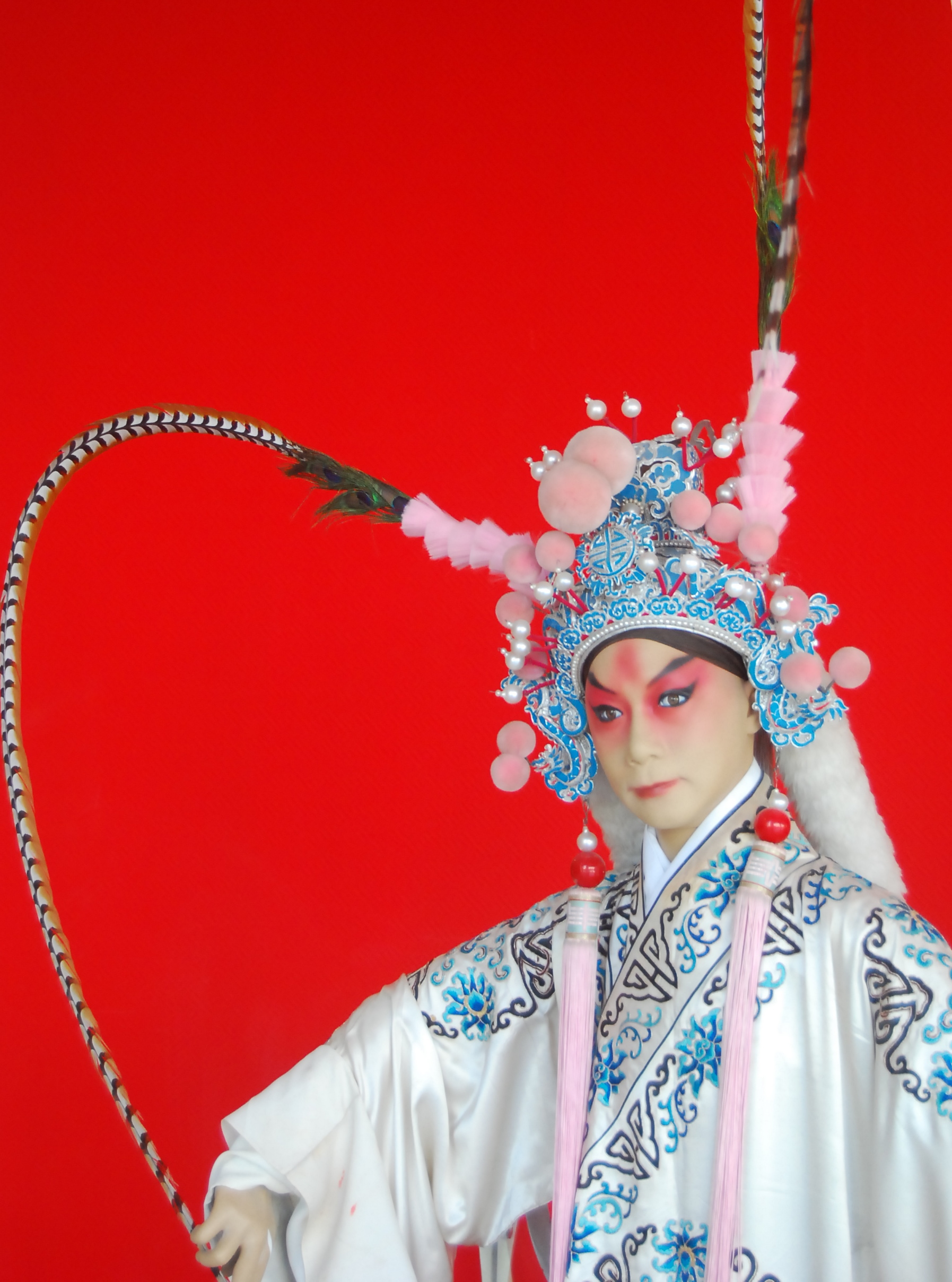 京剧中的杨文广扮相